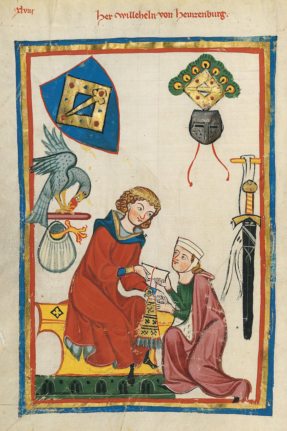 Codex Manesse, UB Heidelberg, Cod. Pal. germ. 848, fol. 162v, Wilhelm von Heinzenburg, vermutlich Wilhelm III. von Heinzenberg (1264-1292 bezeugt).